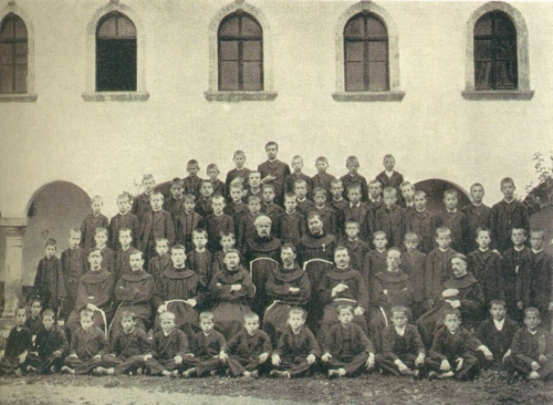 Gučogorski učenici ispred crkve iz 1900. godine